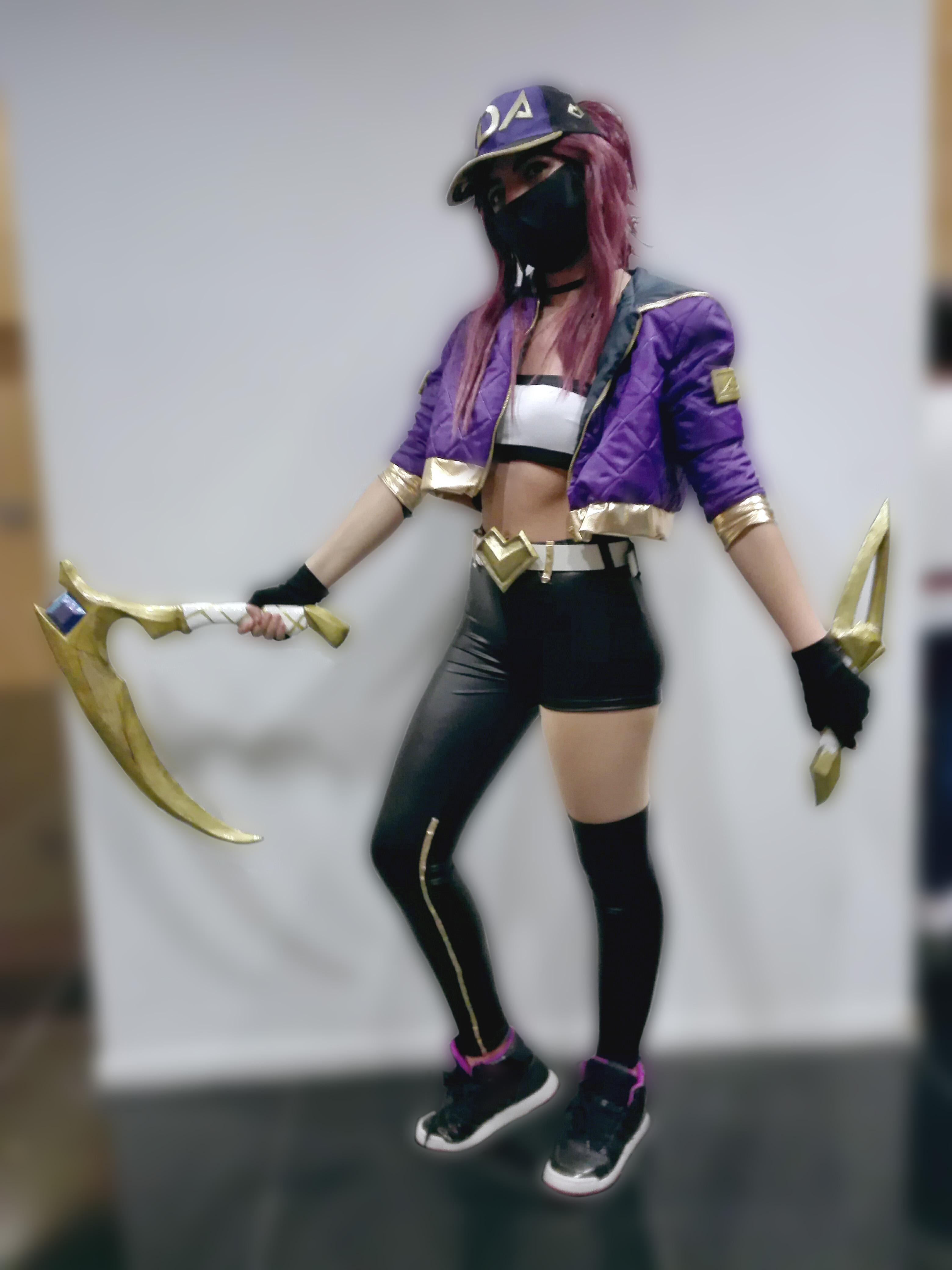 Cosplay de Akali (League of Legends) Expotaku Logroño 2019